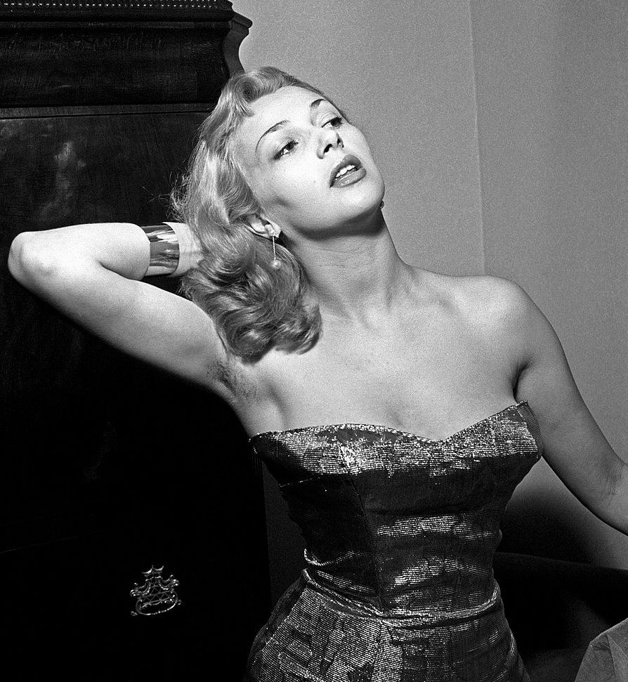 Franca Rame, Rome